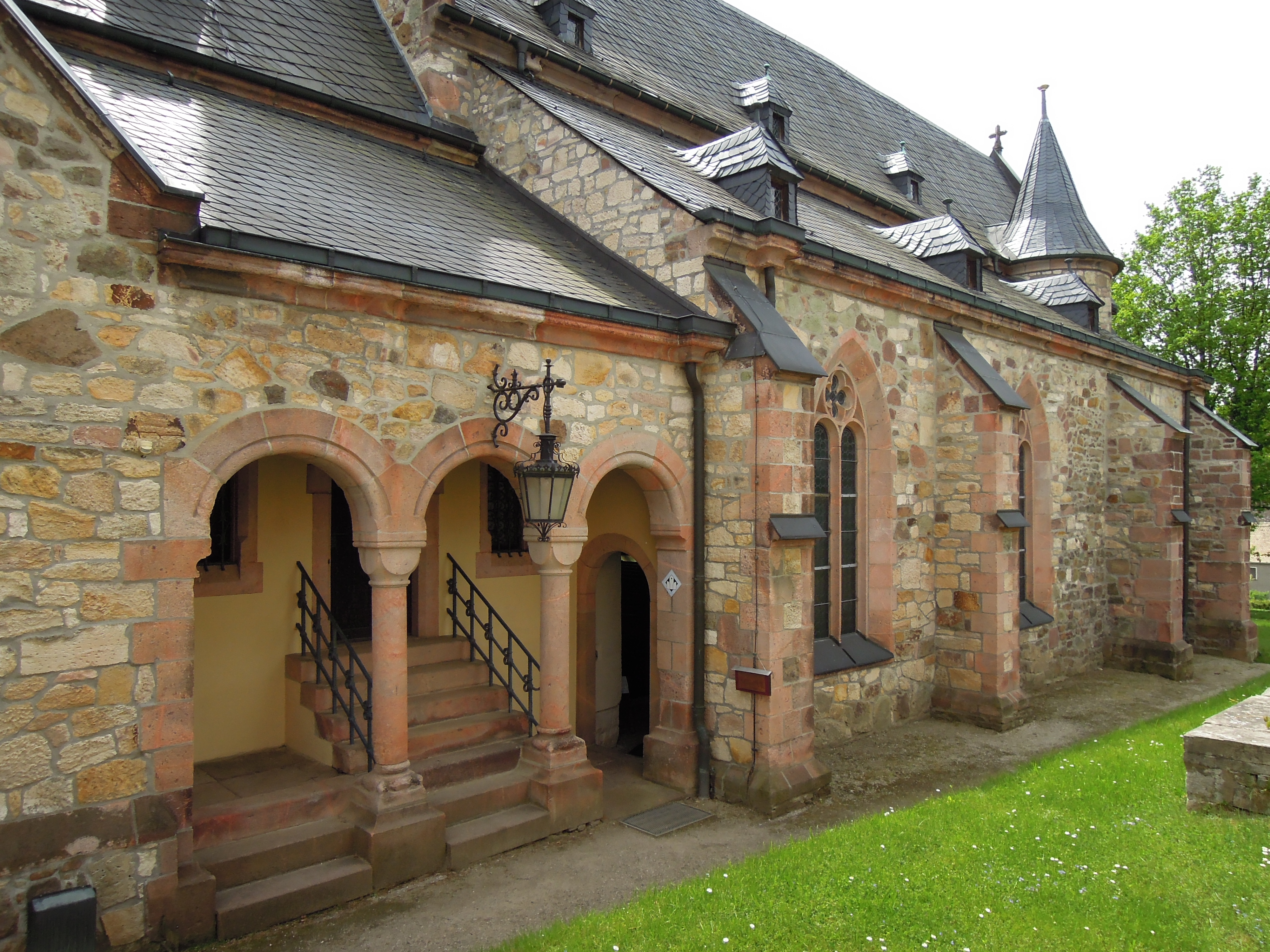 Kohrener Sankt-Gangolf-Kirche Außen Nordseite2 2015